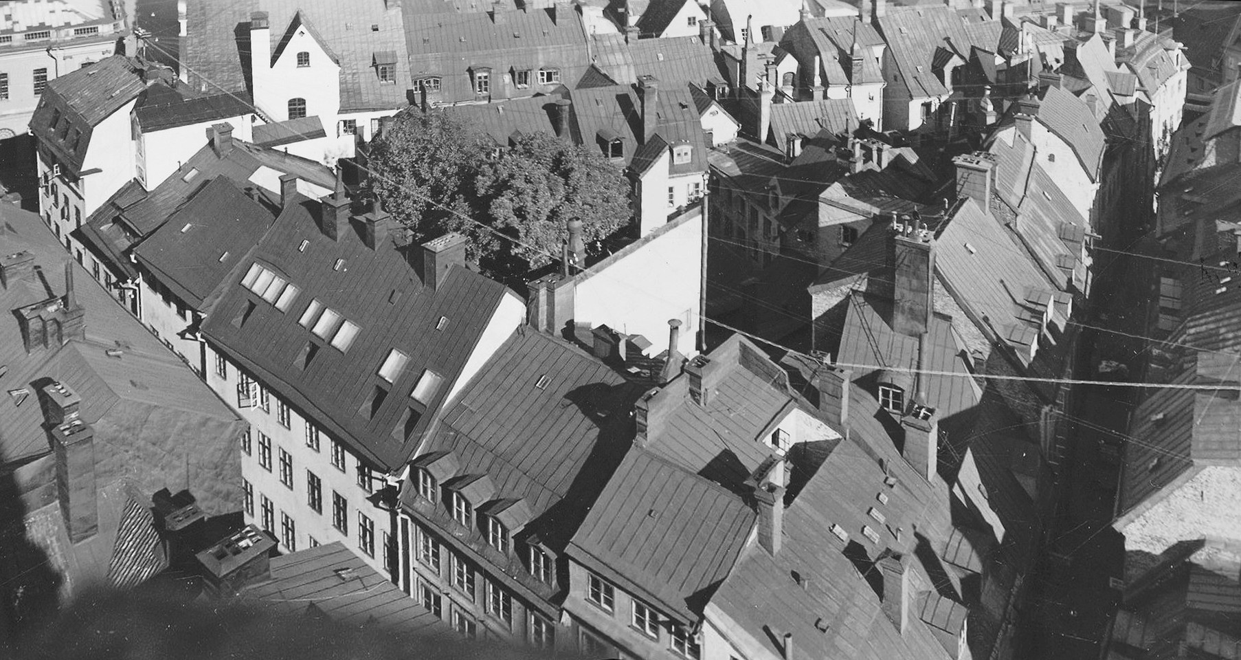 Vy över Kvarteret Cepheus (före ombyggnaden) från Tyska kyrkan